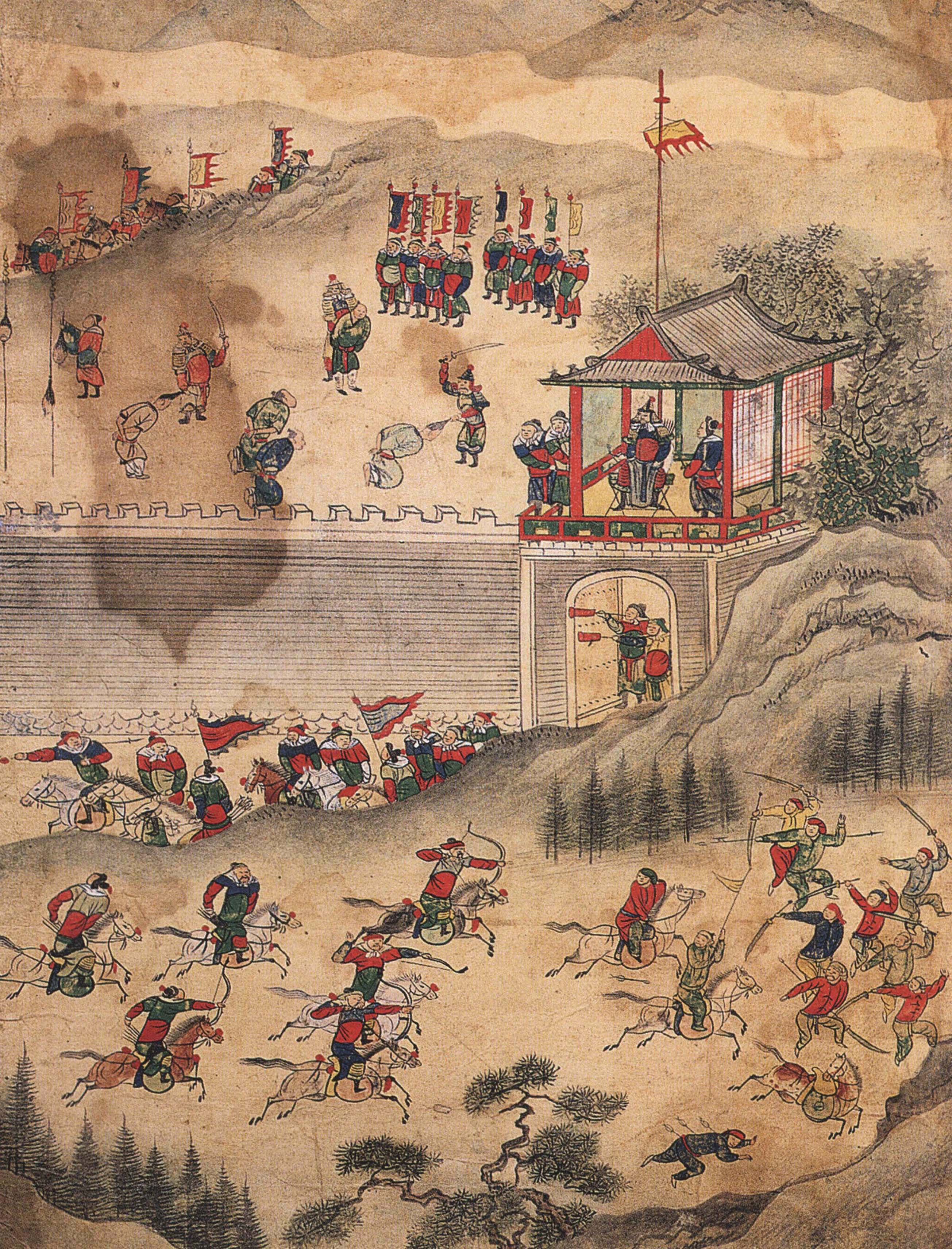 북관유적도첩(北關遺蹟圖帖)-창의토왜도(倡義討倭圖)